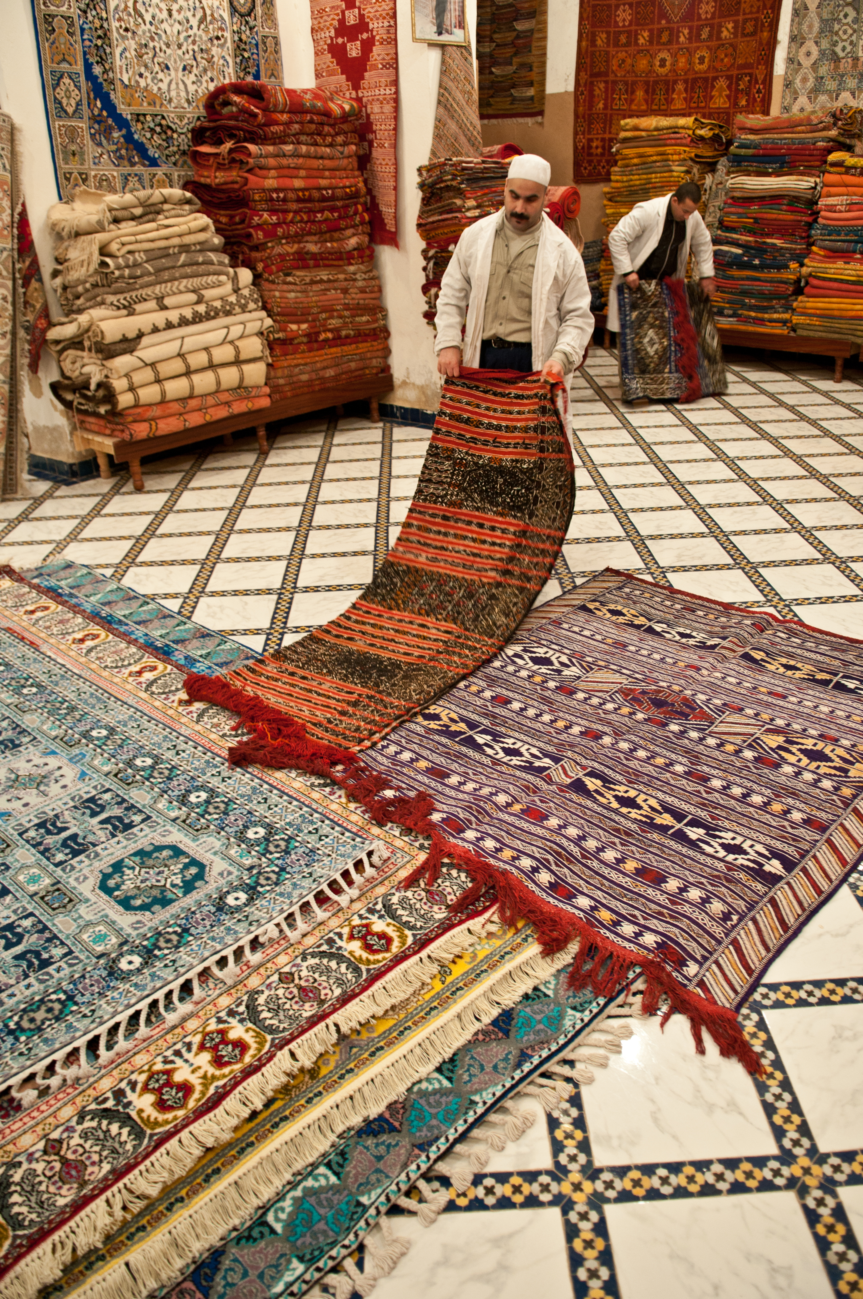 Carpet sellers in Fes